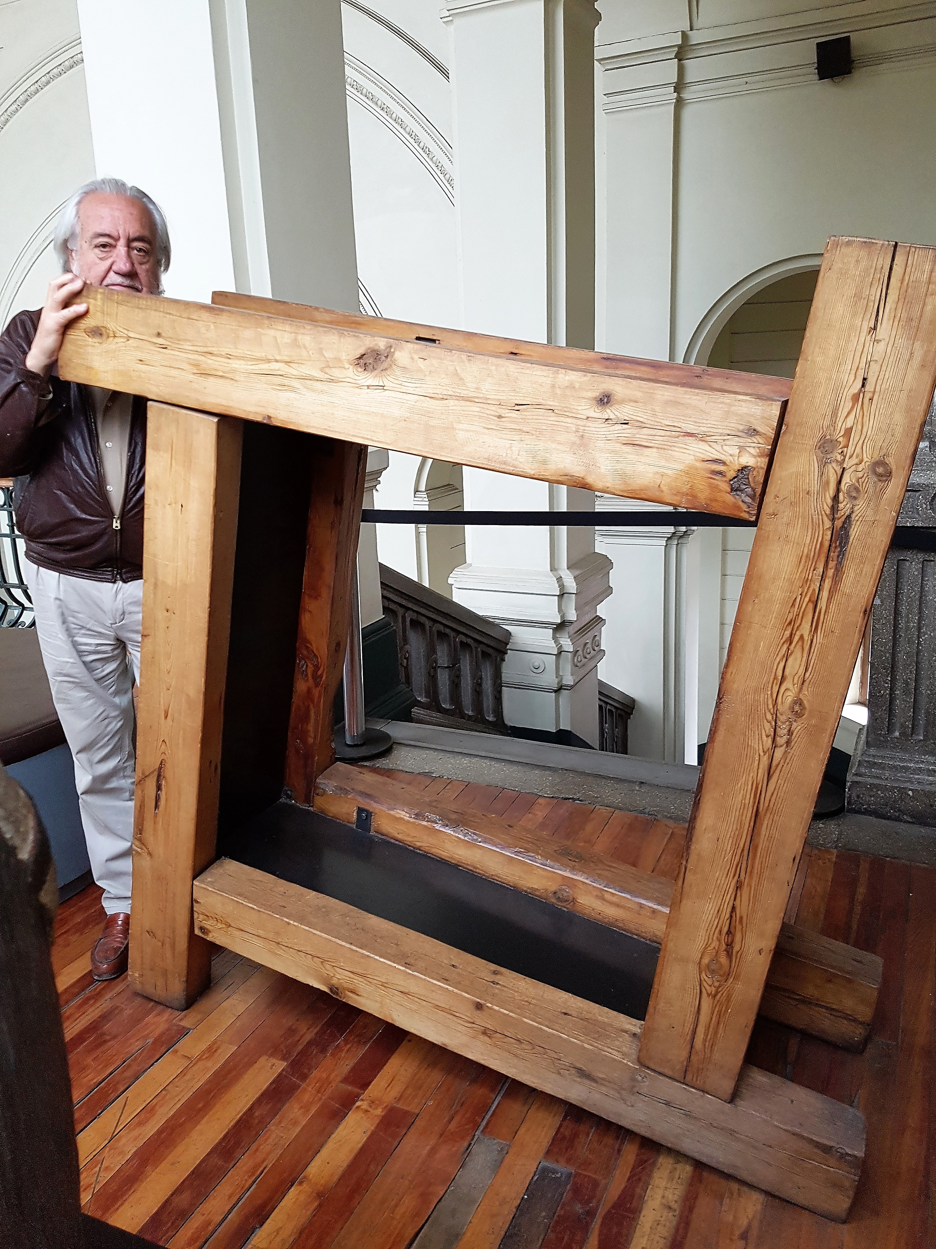 El pintor y escultor chileno Patricio Court junto a su escultura en homenaje a Máximo Trueba expuesta en el Museo Nacional de Bellas Artes de Santiago